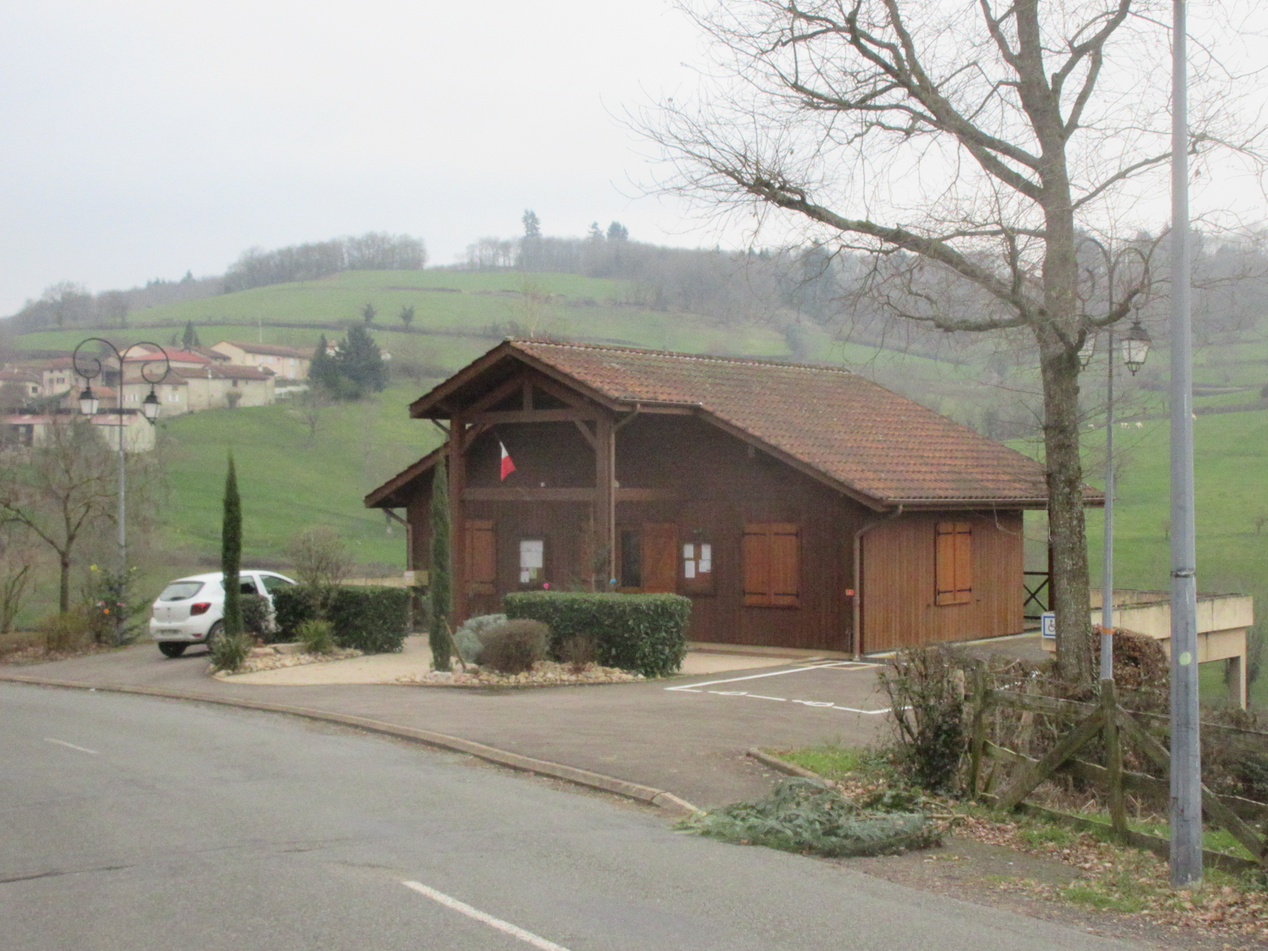 Mairie de Trades.